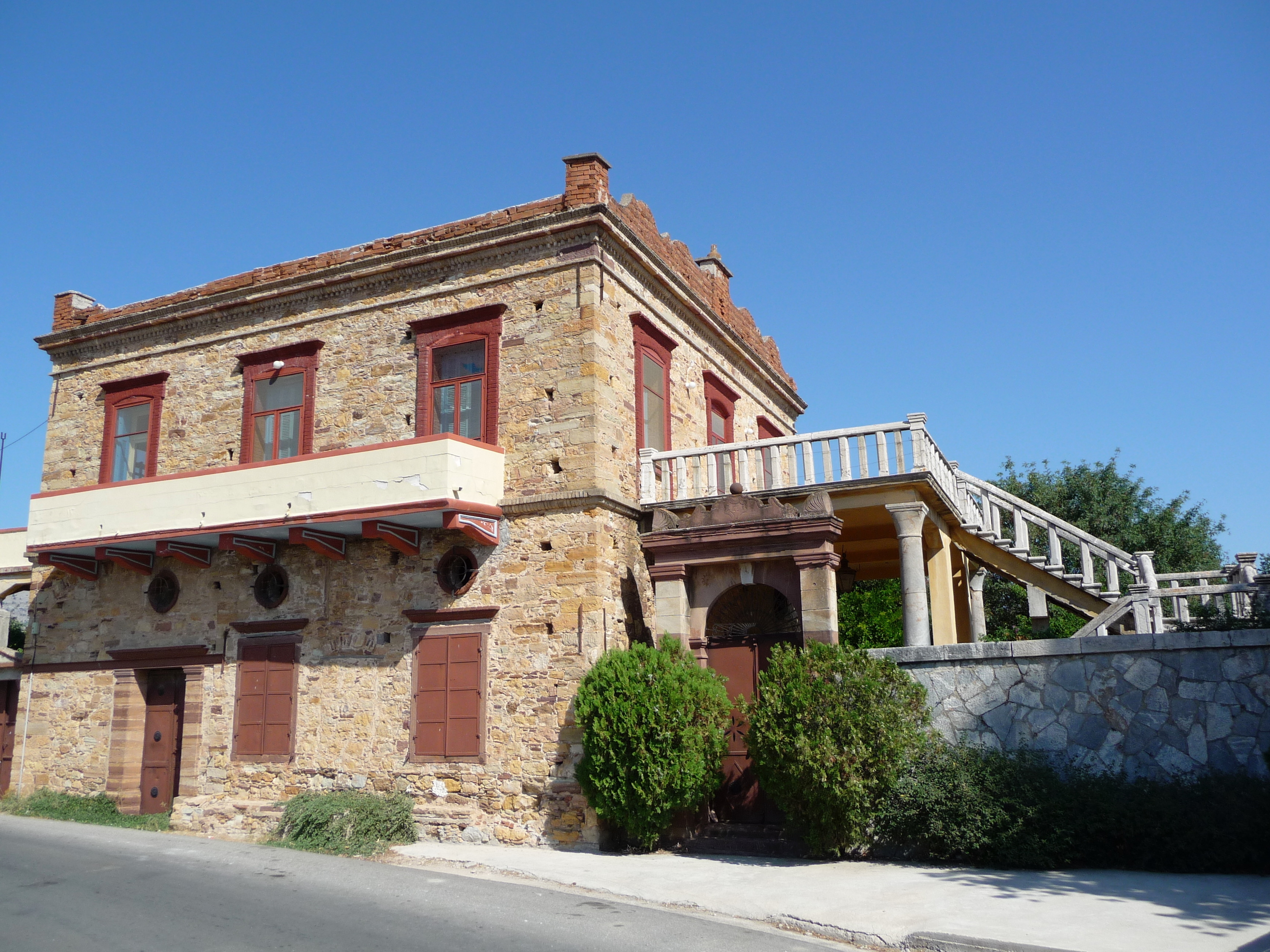 Klassische Villa in Kambos